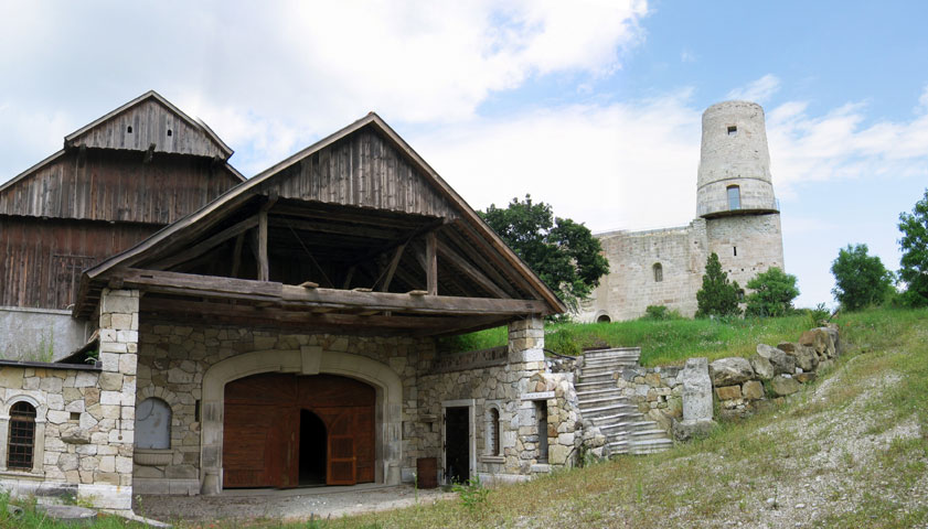 Markgrafneusiedl: Lizenz: GNU FDL Quelle: Foto plp Datum: de:2004 Ort: Markgrafneusiedl, Niederösterreich